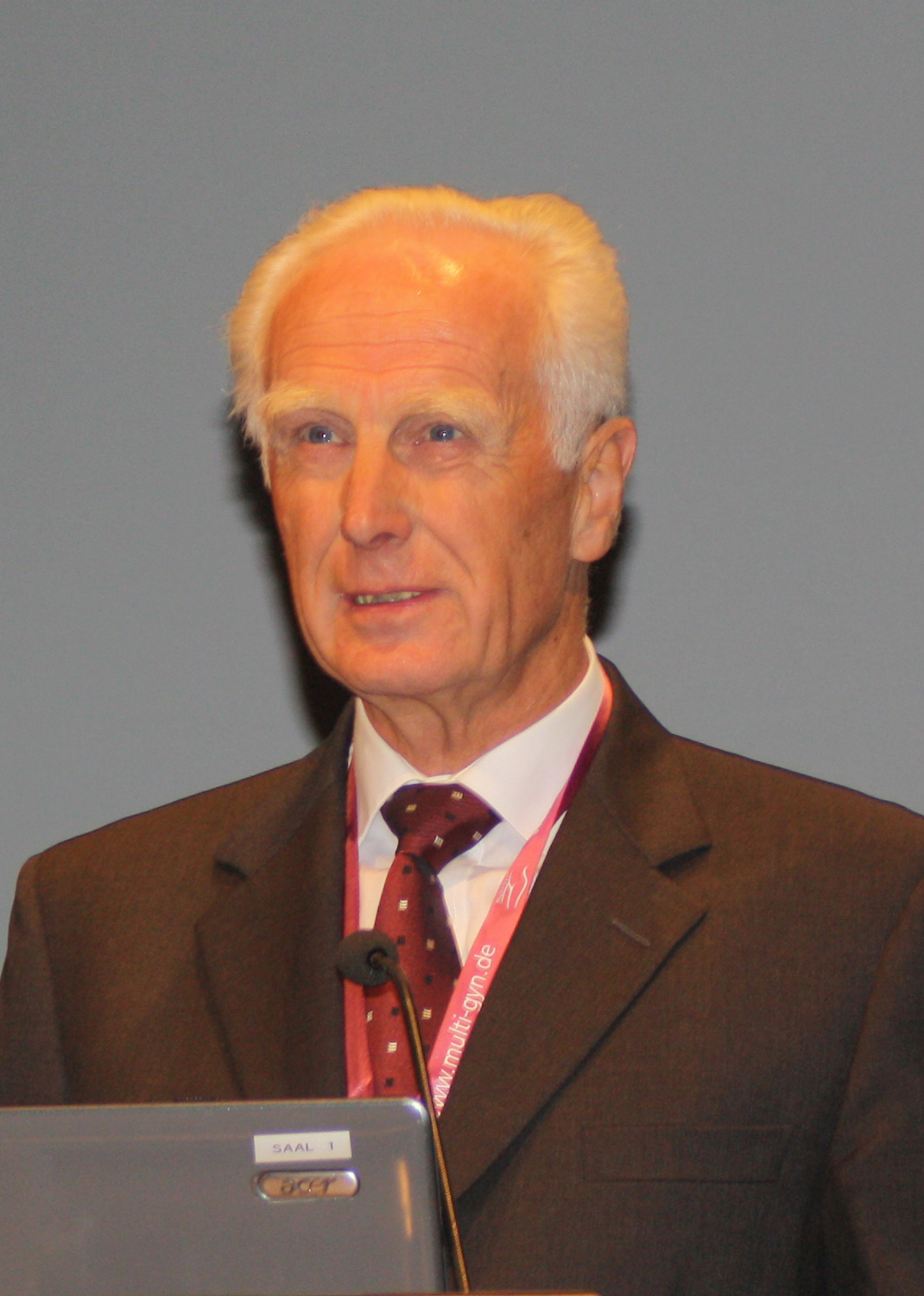 Prof. Dr. Günther Kindermann, Gynäkologe und Geburtshelfer am 5. Oktober 2010 in München.